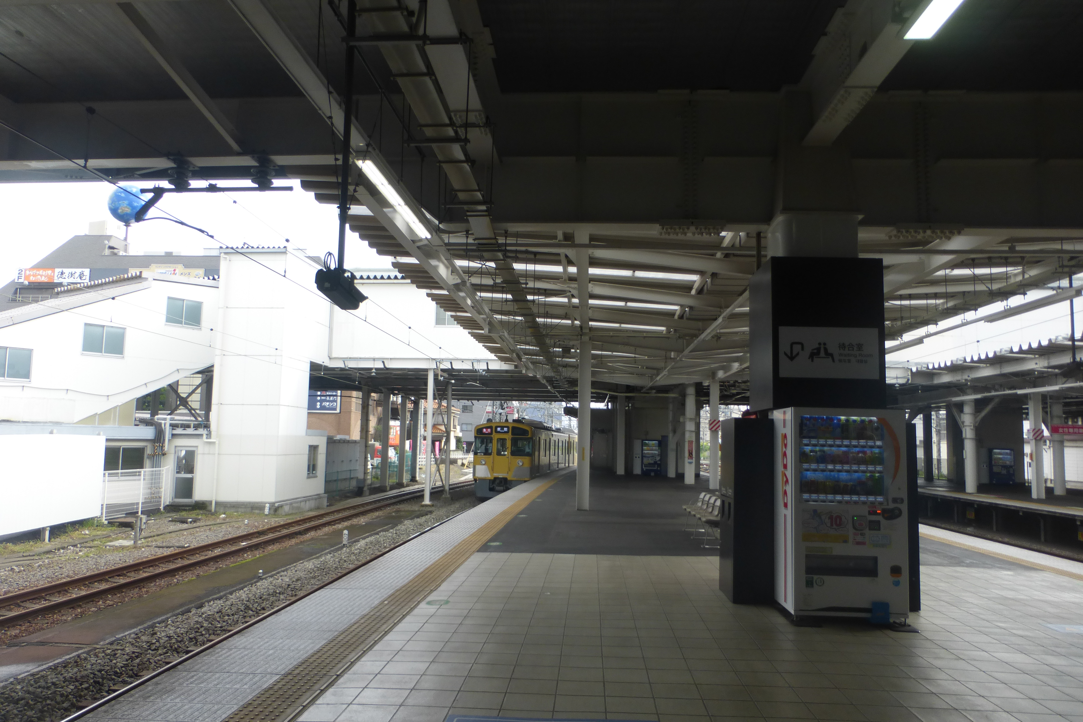 Tokorozawa Station platform (所沢駅のホーム)